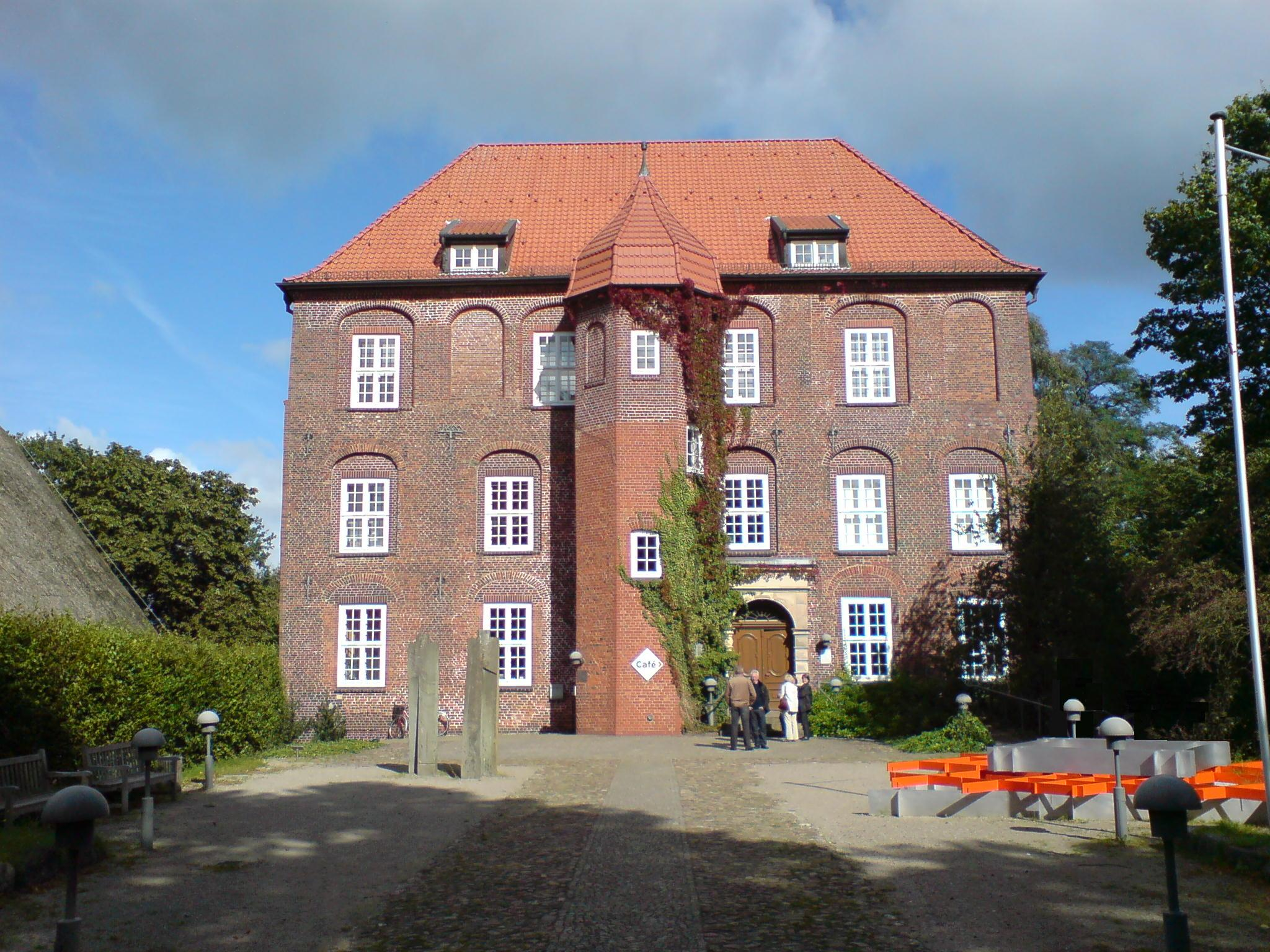 = Schloss Agathenburg, Hof Urheber = PodracerHH 21:54, 29. Mai 2007 (CEST)